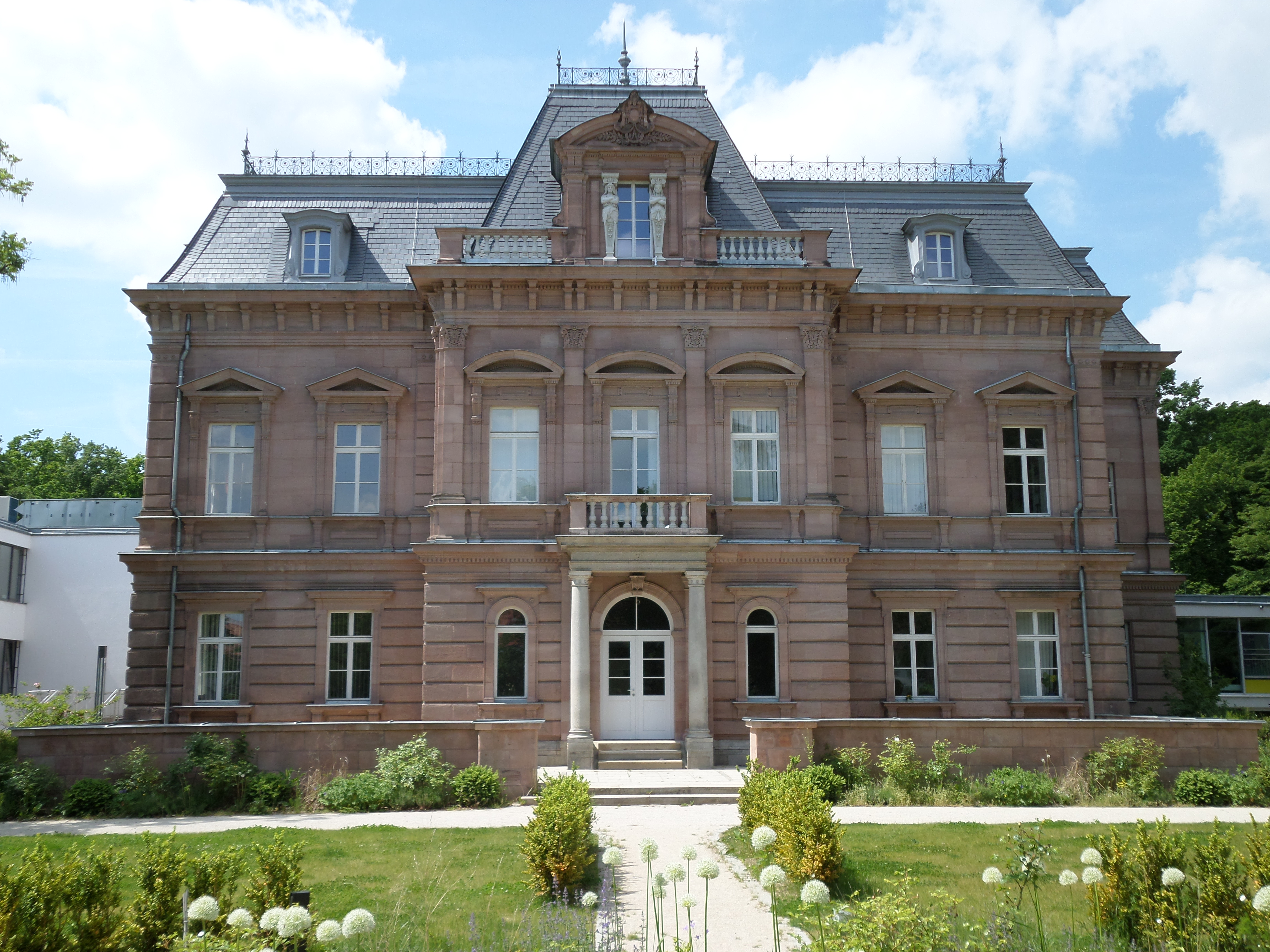 Dutzendteichstraße 24 - Villa Spaeth (ursprünglich zur Maschinenfabrik J. W. Spaeth- Dutzendteich gehörig), zweigeschossiger Sandsteinquaderbau mit Mansardwalmdach und Mittelrisalit, reicher Neubarock, von Conradin Walther, 1872, Umbau von Ludwig Ruff, 1930-37. - D-5-64-000-378